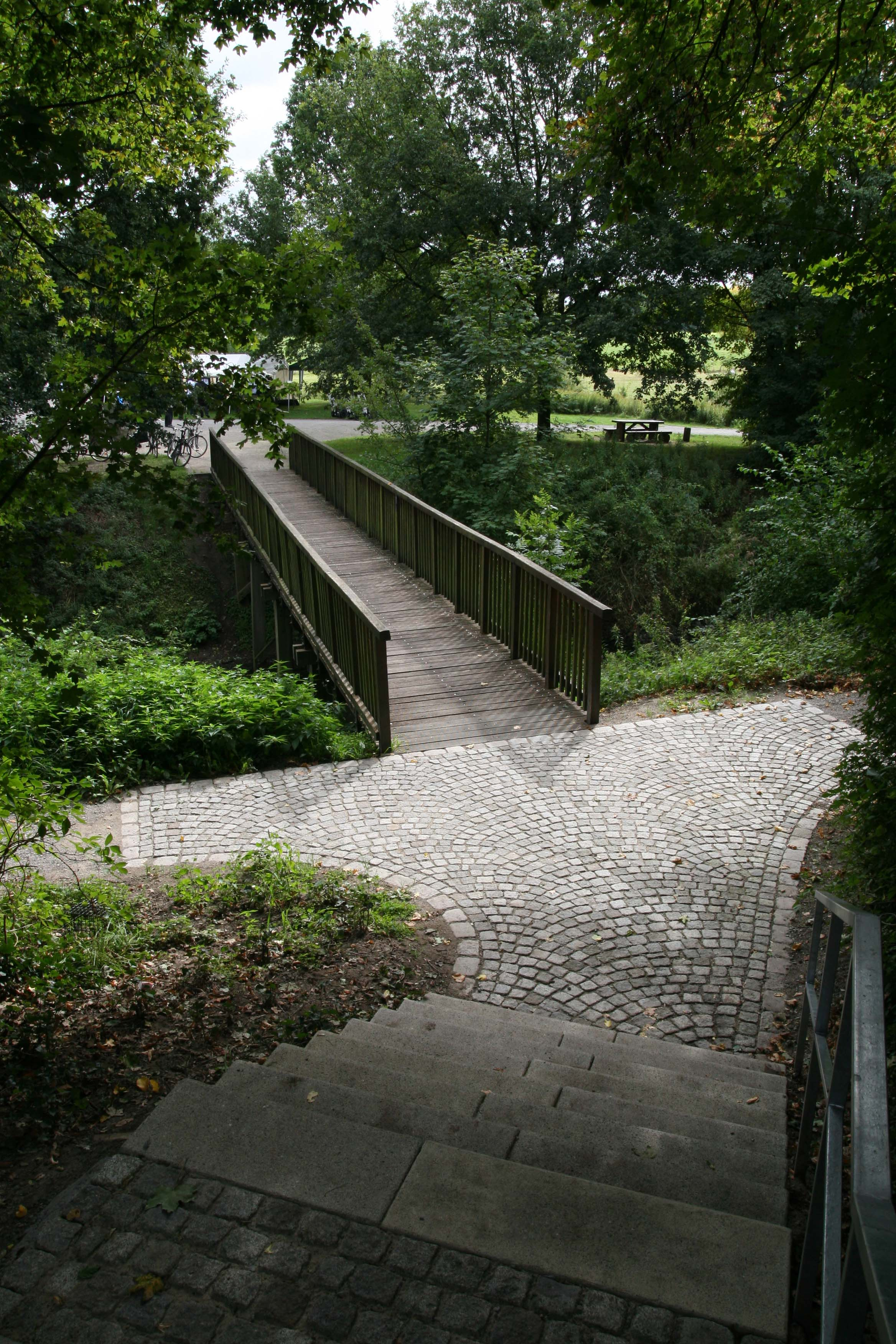 Das Foto zeigt den Steg über die Gräfte und die Treppe zwischen Vorburg und Hauptburg auf dem Burghügel Mark in Hamm.